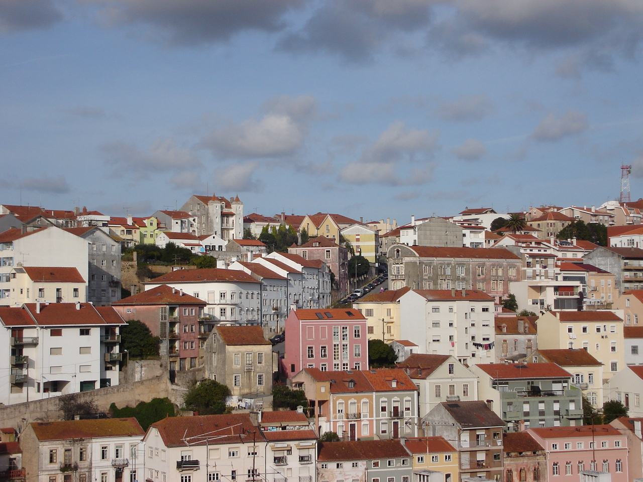 Coimbra, Portugal